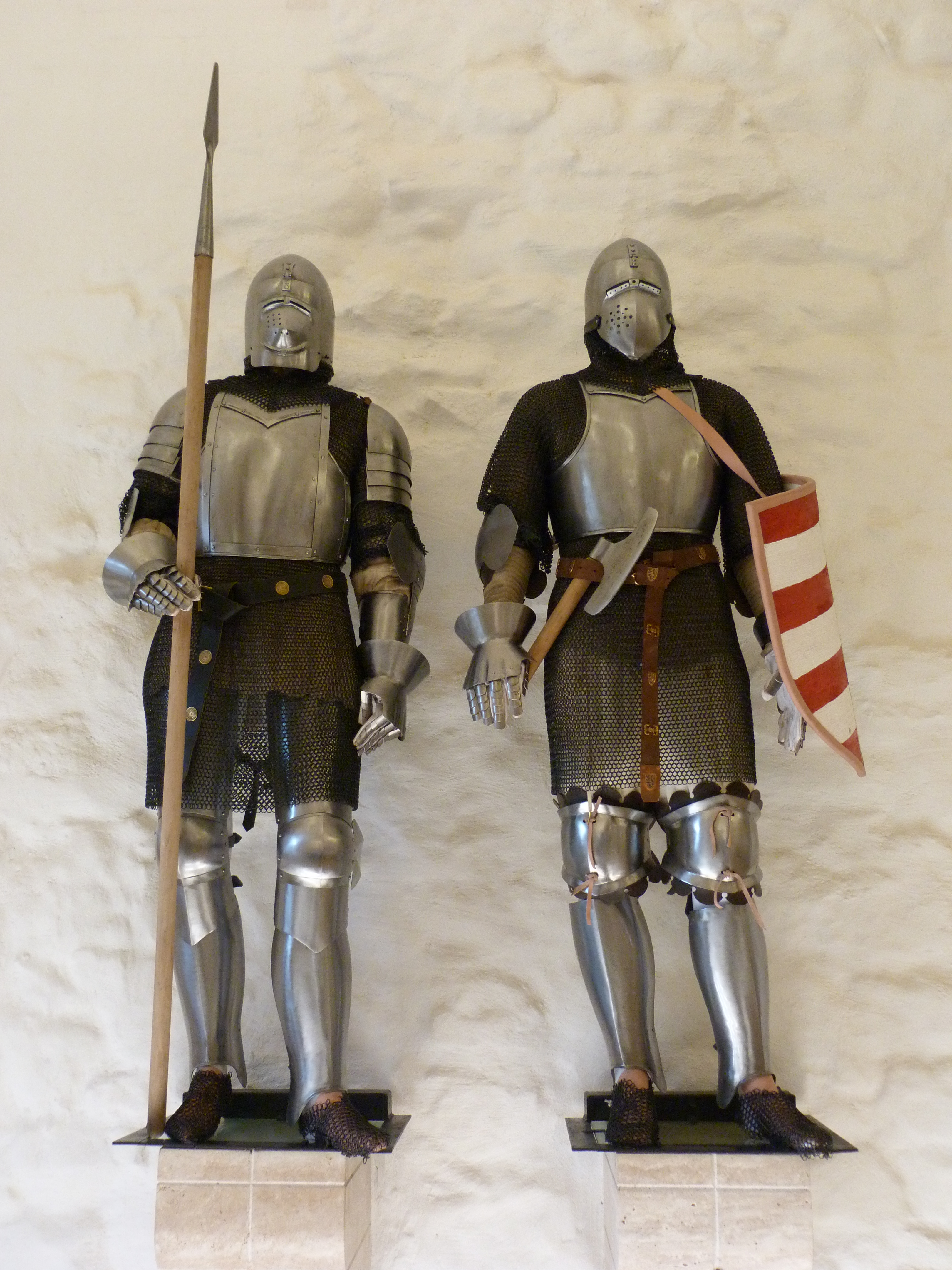 A felvétel 2015. február 7-én szombaton készült Diósgyőr Várában. ©© Derzsi Elekes Andor, Budapest, 2015, A fénykép másolását és felhasználását a szerző ellenérték nélkül, jogutódjaira is kihatóan megengedi. Az engedély kiterjed a kereskedelmi célú hasznosításra is. Kéri azonban nevének feltüntetését a felhasználás során. A Metapolisz sorozat valamennyi képe és filmje Creative Commons alatti valamint kereskedelmi - for profit - célra is felhasználható. Ajánlott hivatkozás: Derzsi Elekes Andor: Metapolisz DVD line